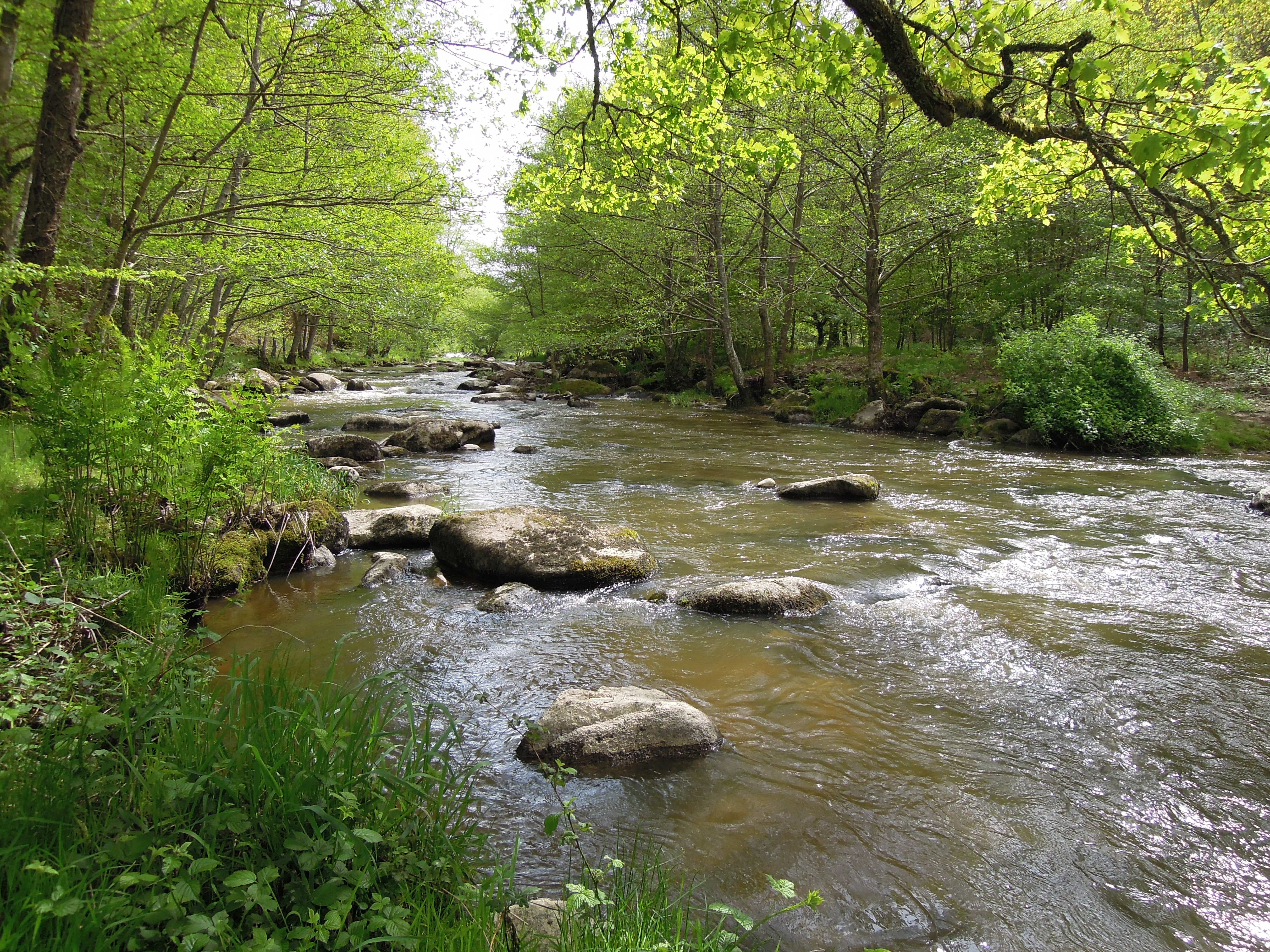 La Sédelle sur la commune de Crozant, Creuse.